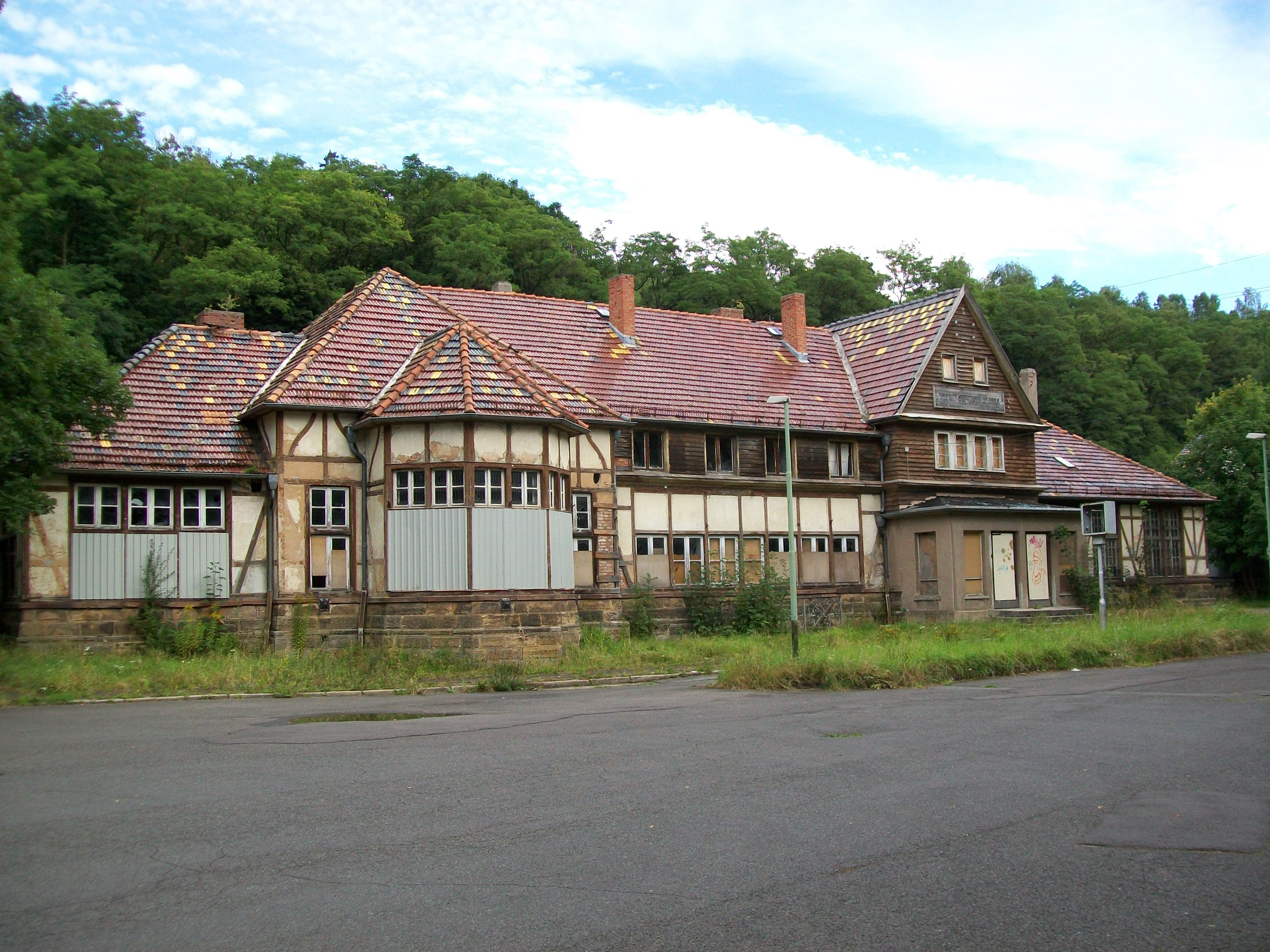 Bahnhof Reinhardsbrunn bei Friedrichroda (Deutschland/Kreis Gotha)